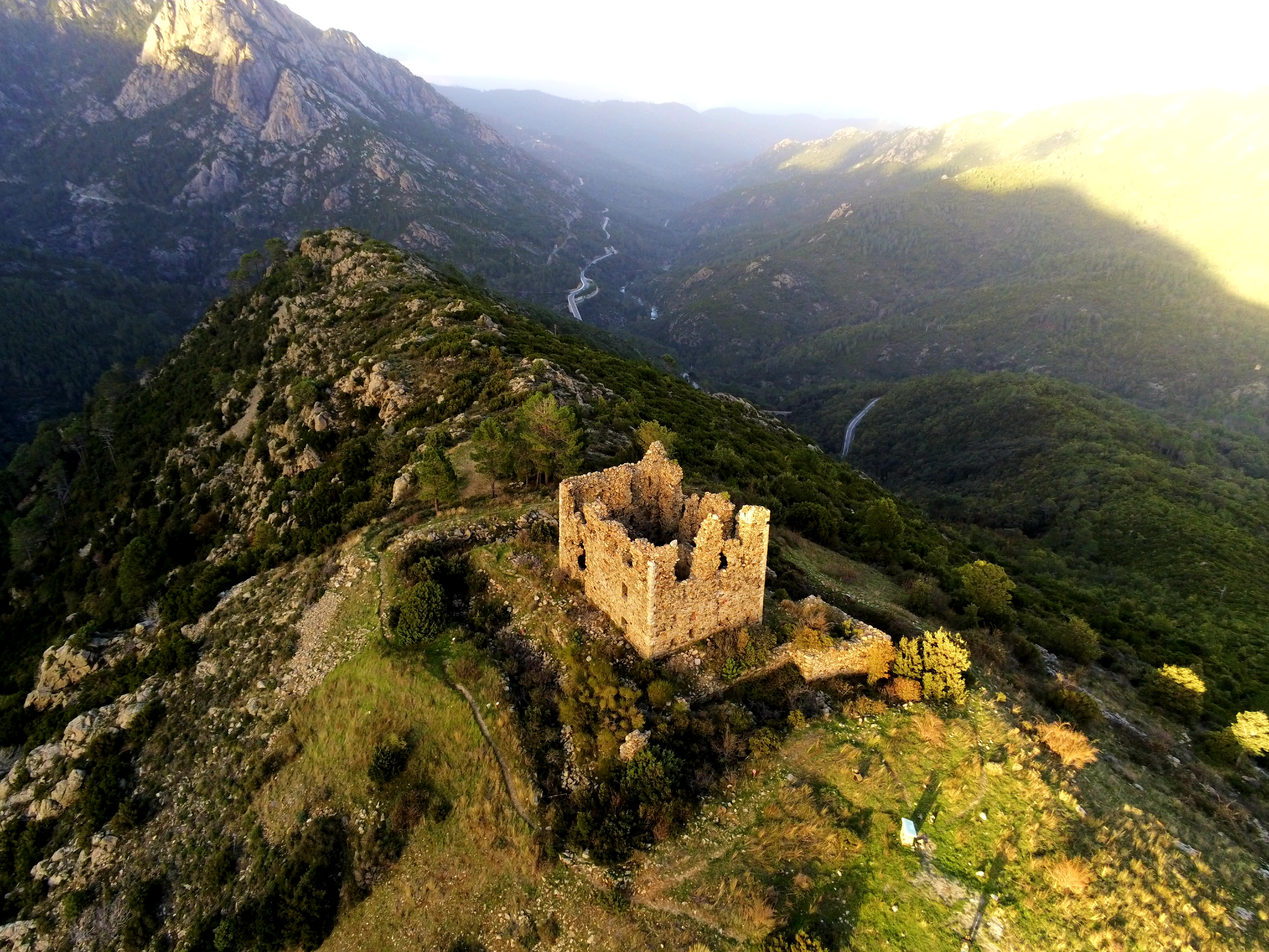 Fortin de Vivario ruine de pasciolo